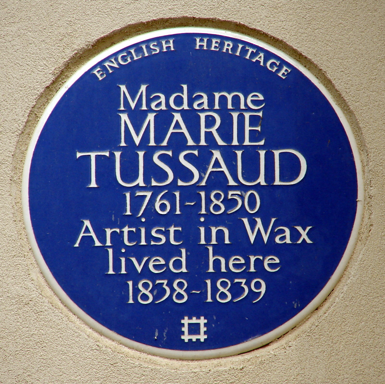 Madame Marie Tussaud